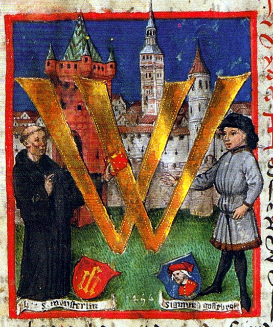 Sigismund Meisterlin: Augsburger Chronik 1457, Staats- und Stadtbibliothek Augsburg 2° Cod. Aug. 60 Bl. 1r. Der Chronist überreicht Sigismund Gossembrot dem Älteren seine Stadtchronik (1458)